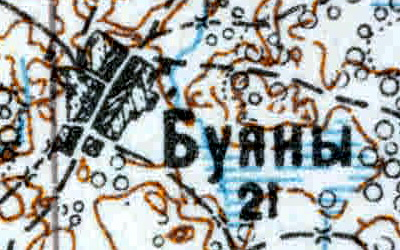 Топографическая карта Ленинградской области, квадрат VIc-28 (Луга), деревня Буяны